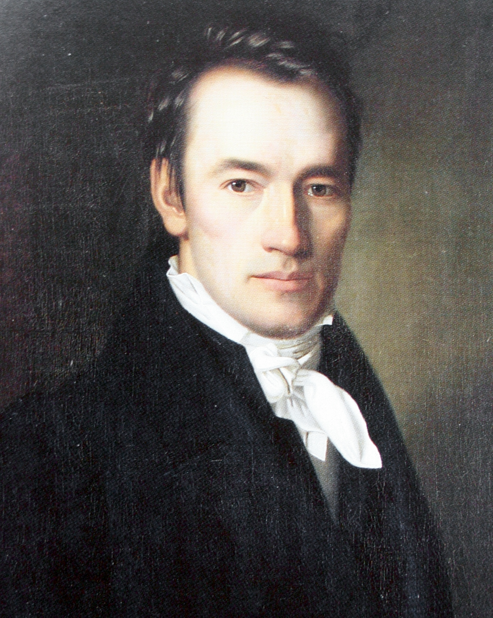 Thomas Scherr, erster Direktor des Seminars Küsnacht. Original im Besitz der Kantonsschule Küsnacht